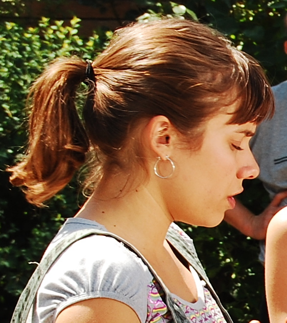 Ensayo de la telenovela chilena Lola con María Gracia Omegna (como Meche), Fabiola Matte (como Natalia) y Gonzalo Olave (como Booggie).